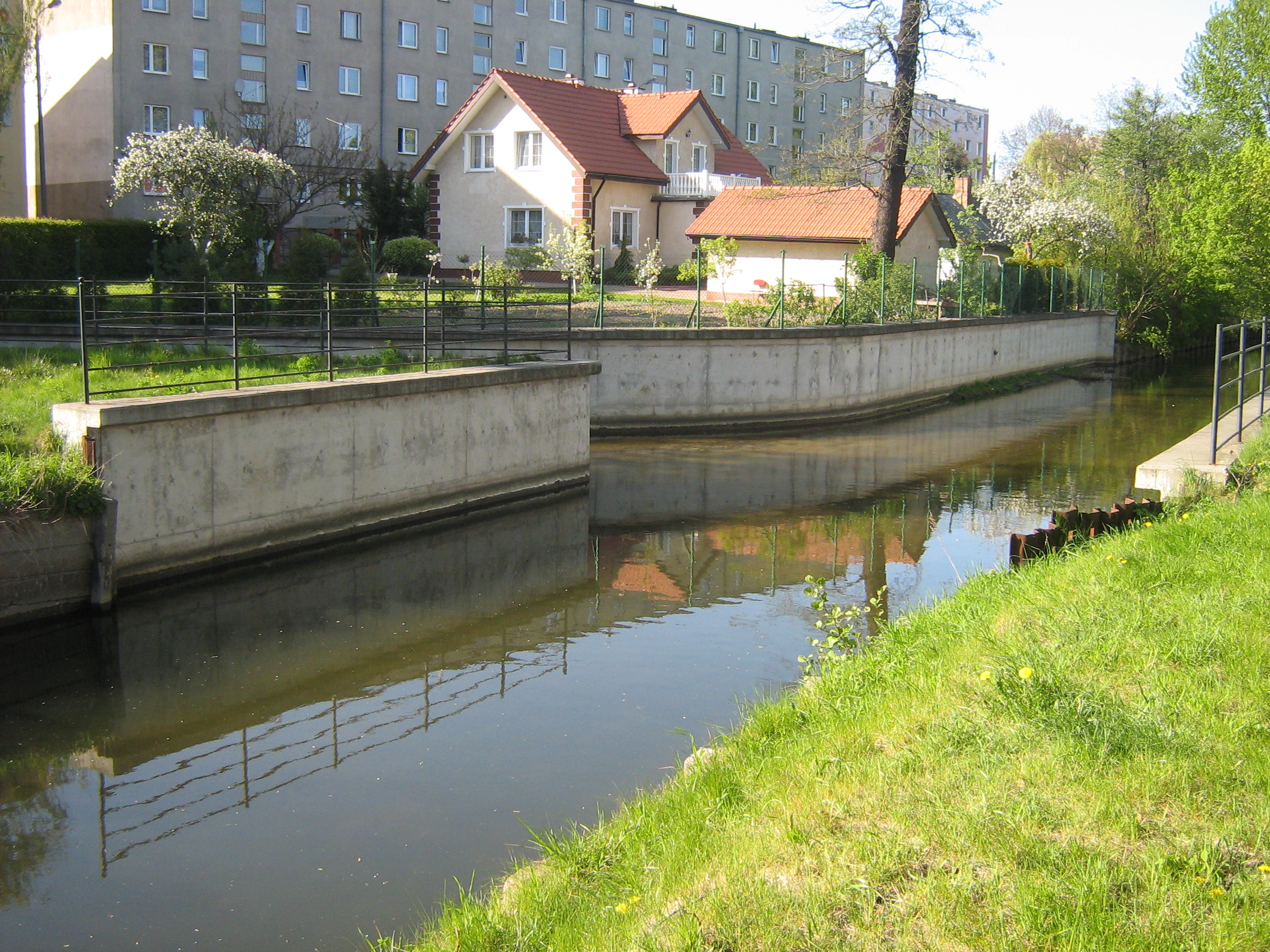 Gdańsk Orunia. Ujście Potoku Oruńskiego (po lewej) do Kanału Raduni (na pierwszym planie), budynki przy ul. Raduńskiej.